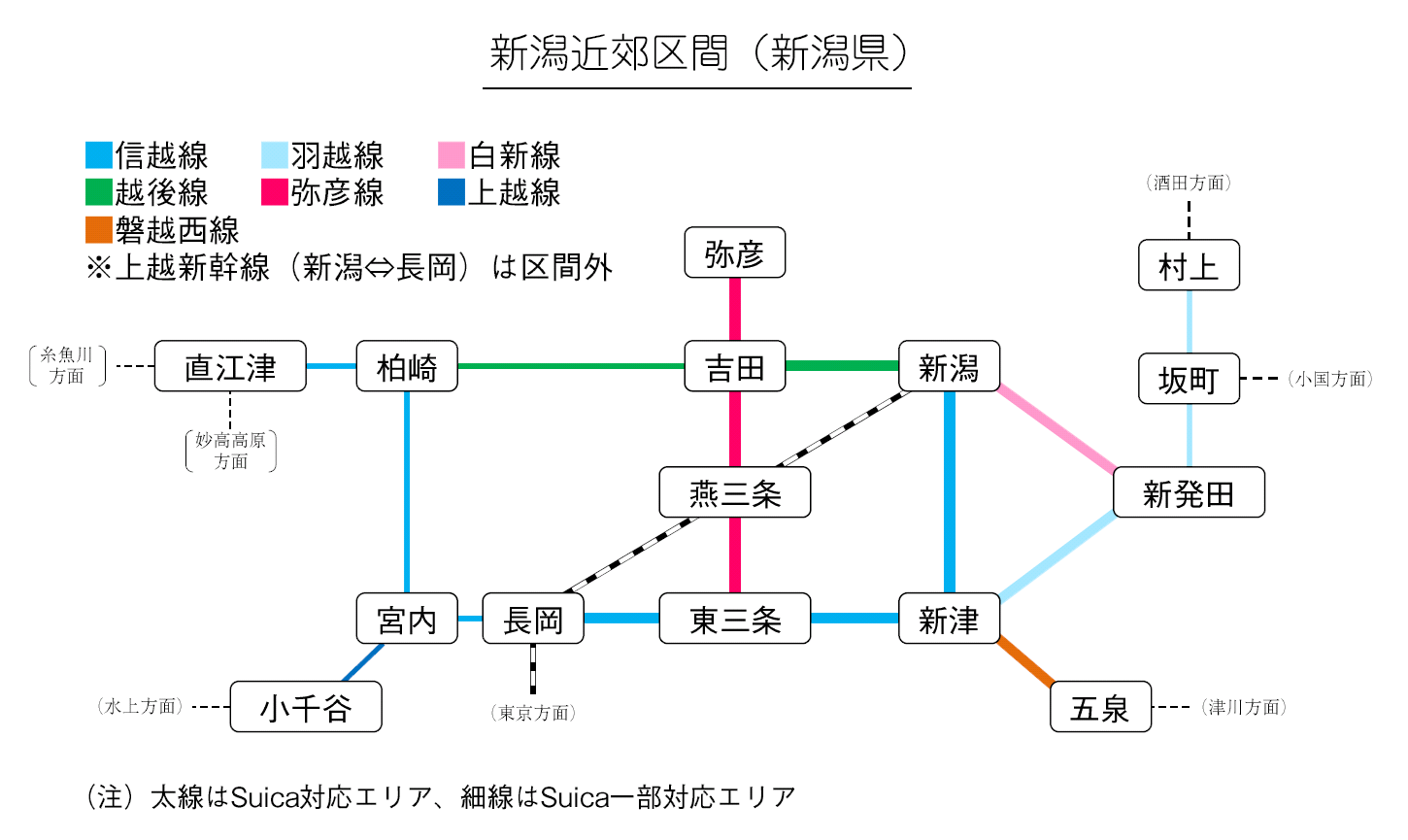 2016年3月現在の新潟近郊区間